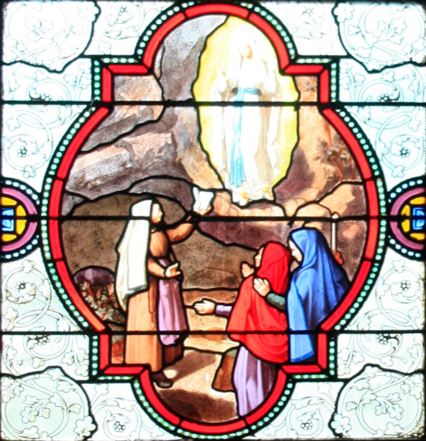 Vitrail de la basilique de l'immaculée conception à Lourdes. Bernadette demandant à la Vierge d'écrire son nom